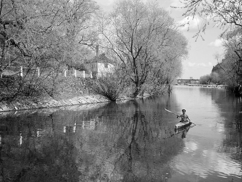 Karlbergskanalen mot öster